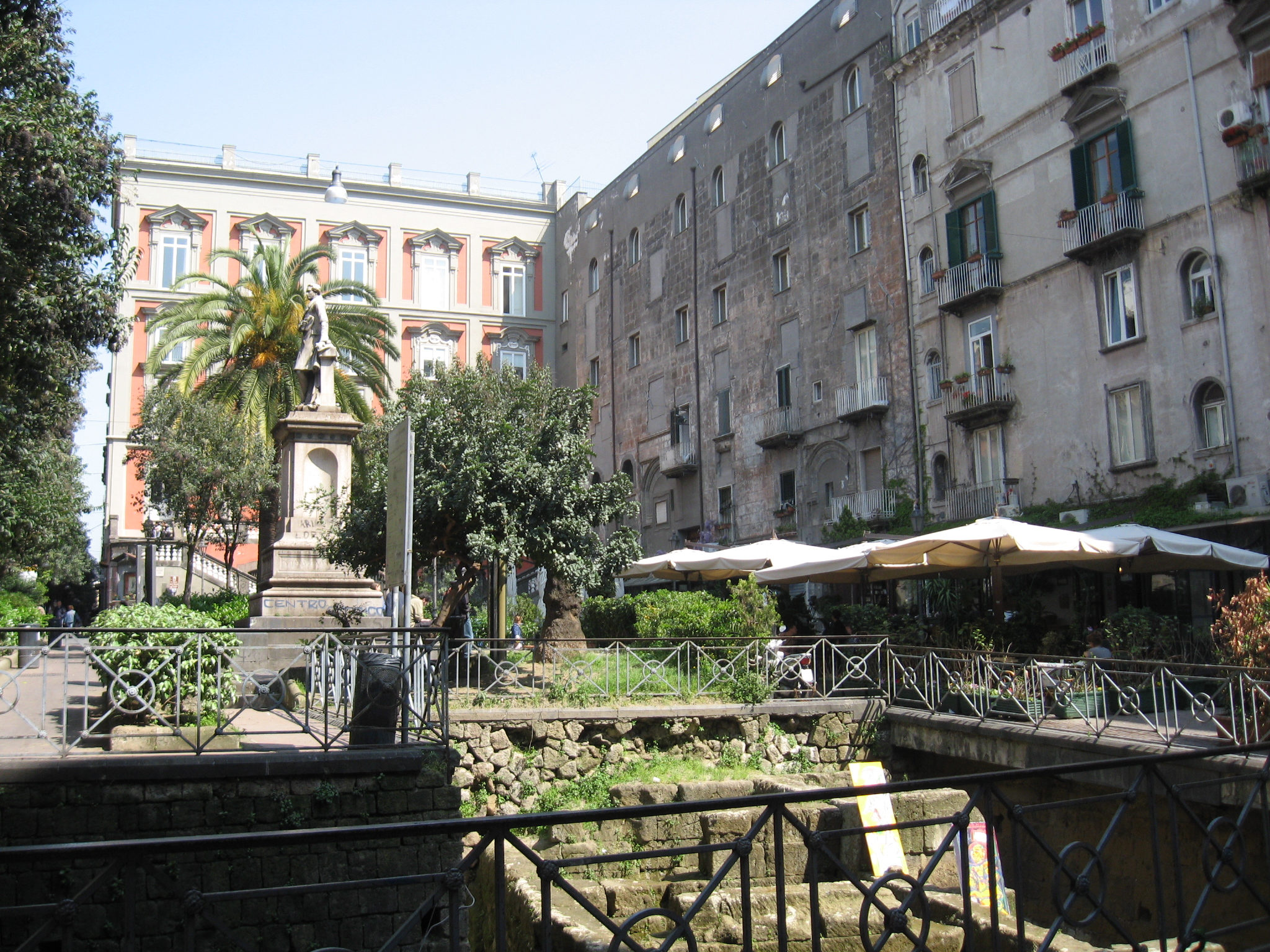 Az egykori görög város falainak romjai Nápolyban